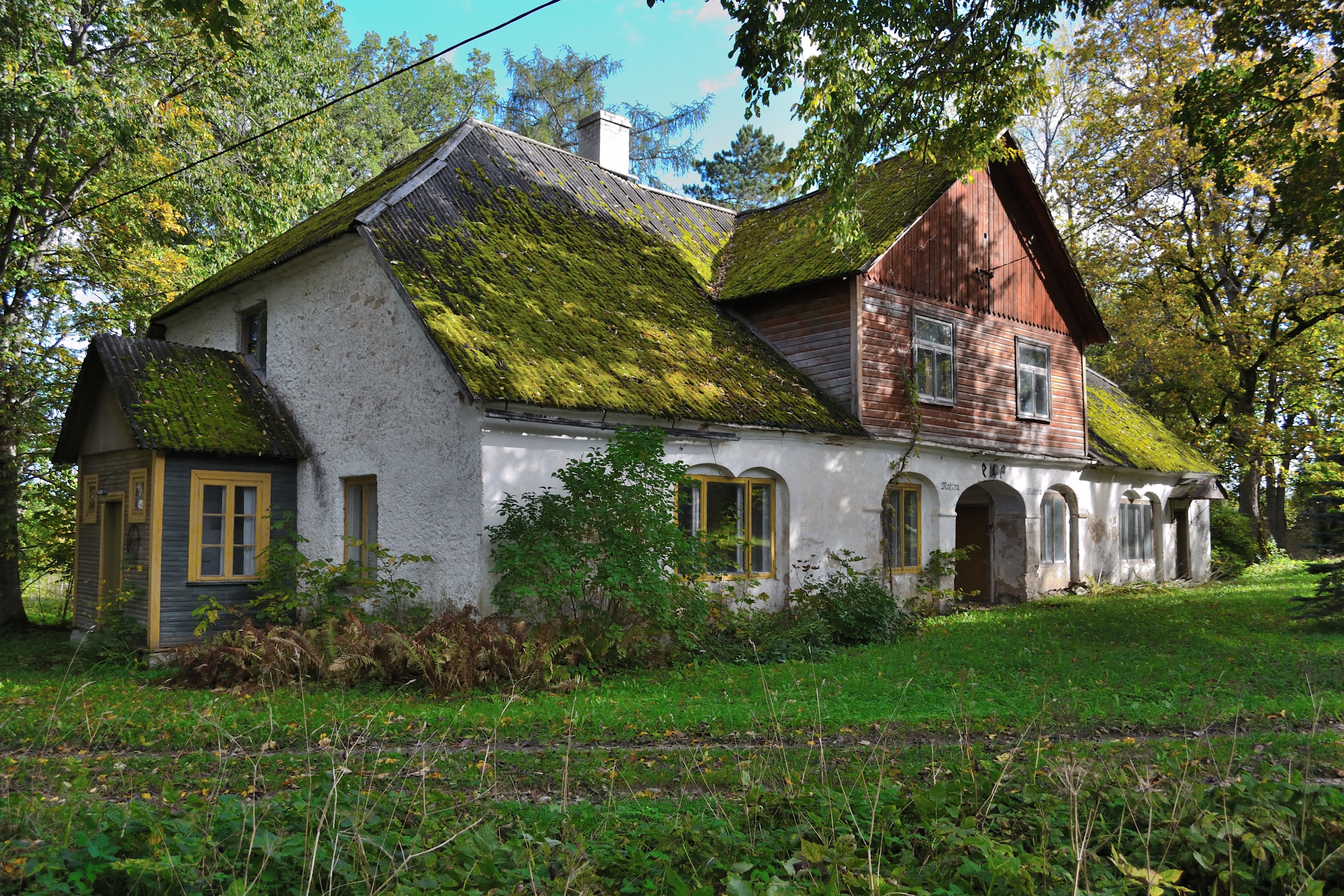 Härgla mõisa valitsejamaja